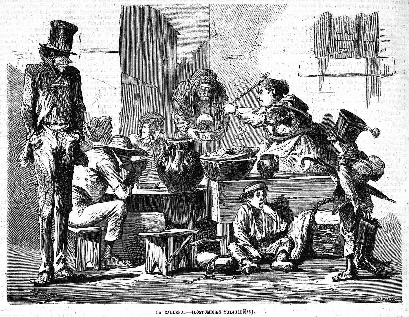 «La callera (costumbres madrileñas)», en la revista española El Museo Universal.